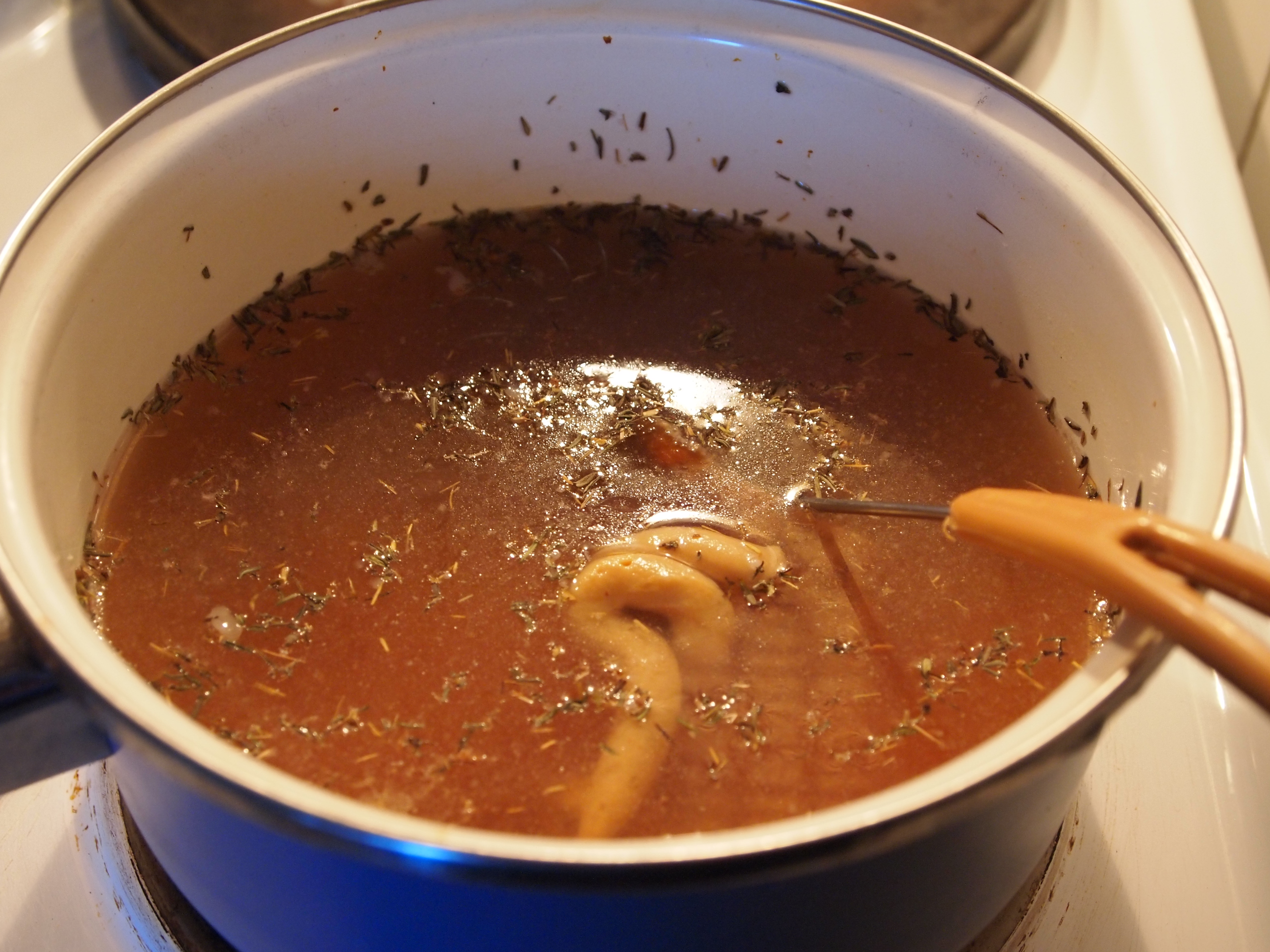 Zubereitung von Senfsoße, hier Zugabe von Senf zum Ansatz aus reduziertem Gemüsefond